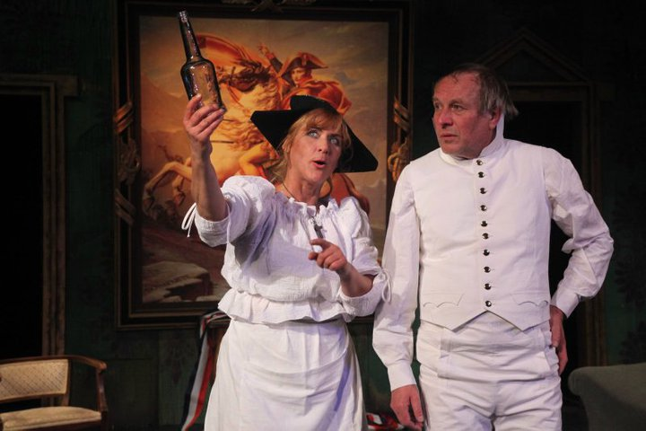 Snímek z inscenace "Generálka Jeho Veličenstva" autora Jiřího Hubače v režii Rudolfa Felzmanna. Na snímku Ivana Nováčková a Petr Bucháček.